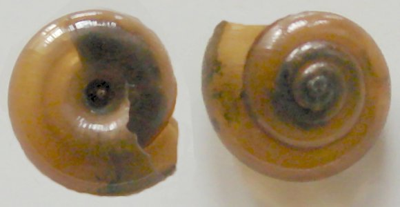 Zonitoides nitidus